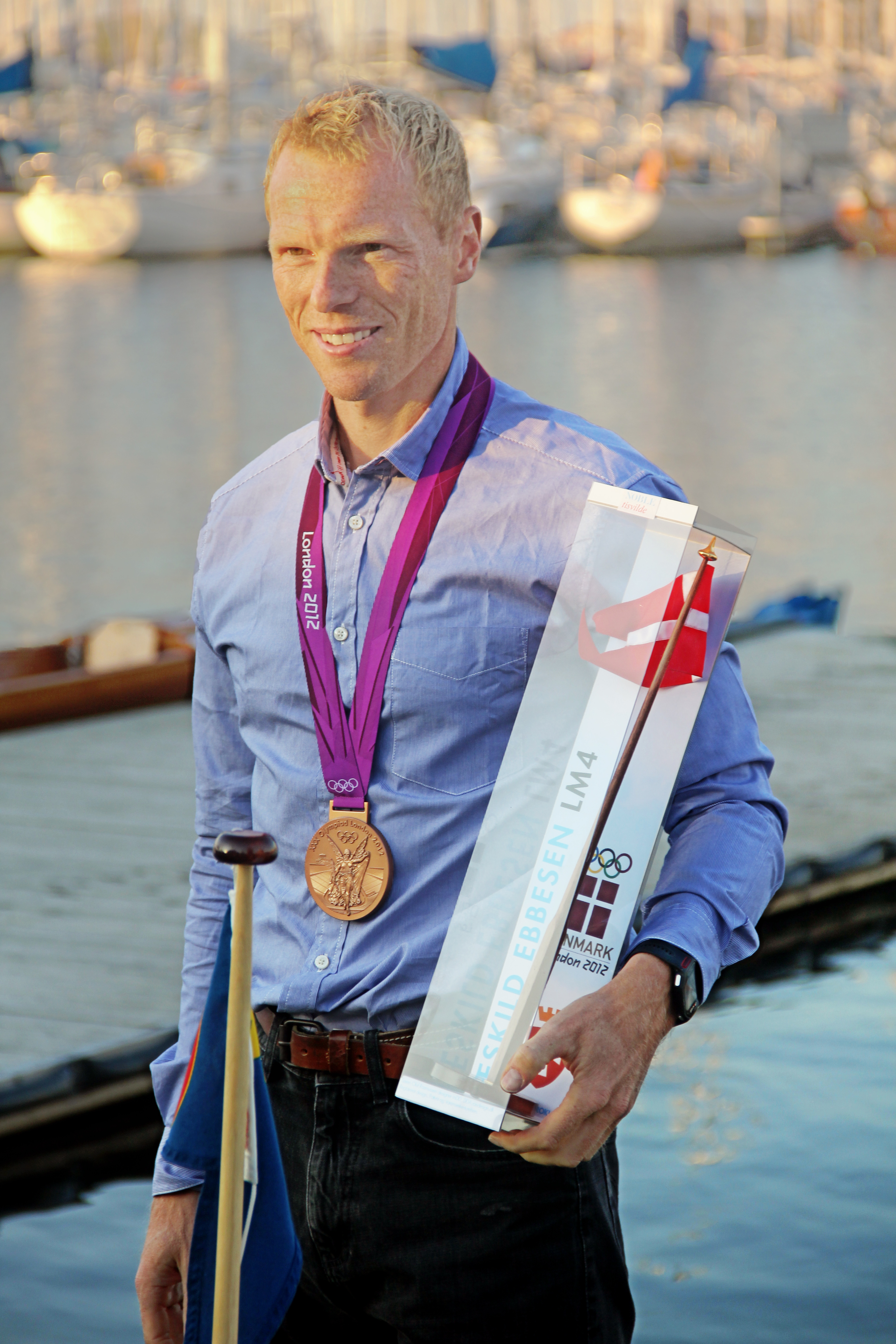 Eskild Ebbesen med medalje.